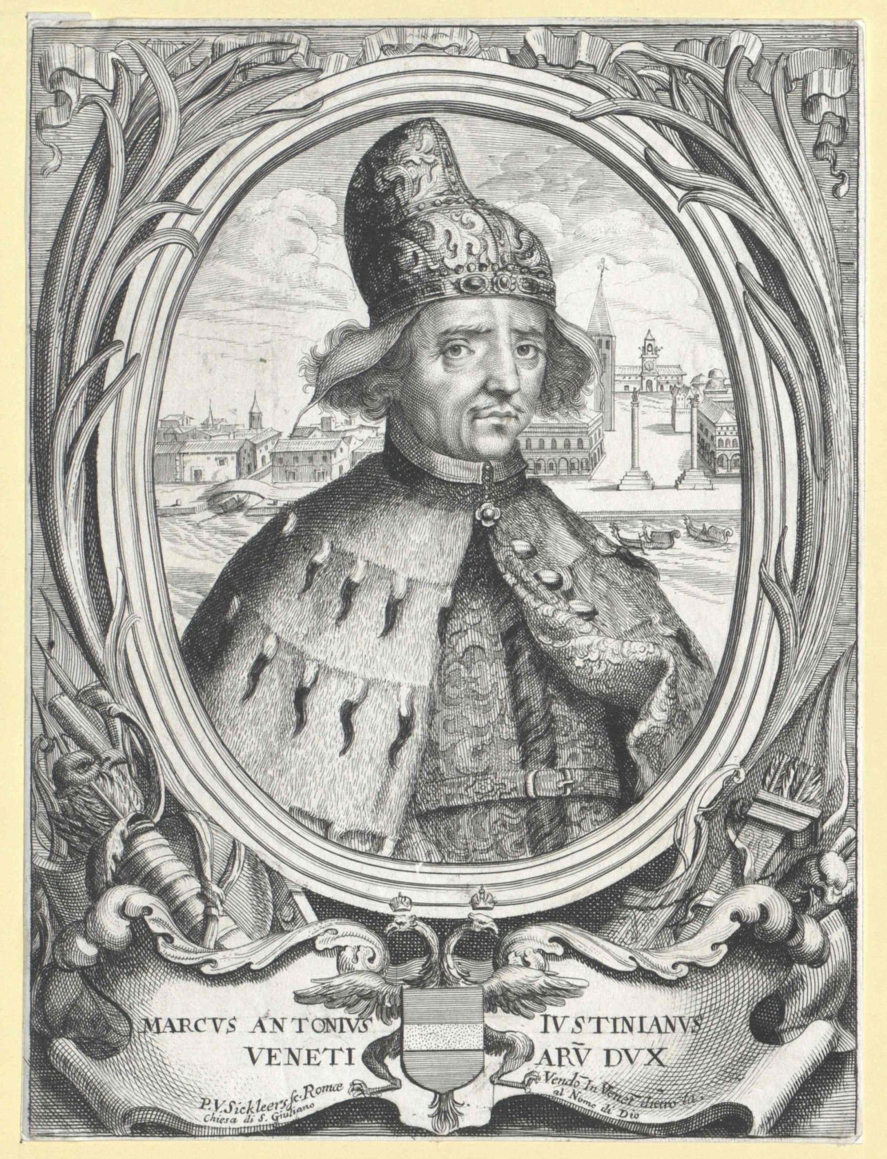 Giustiniani, Marco Antonio (- 1688) Doge, Herzog, Porträt, Venedig